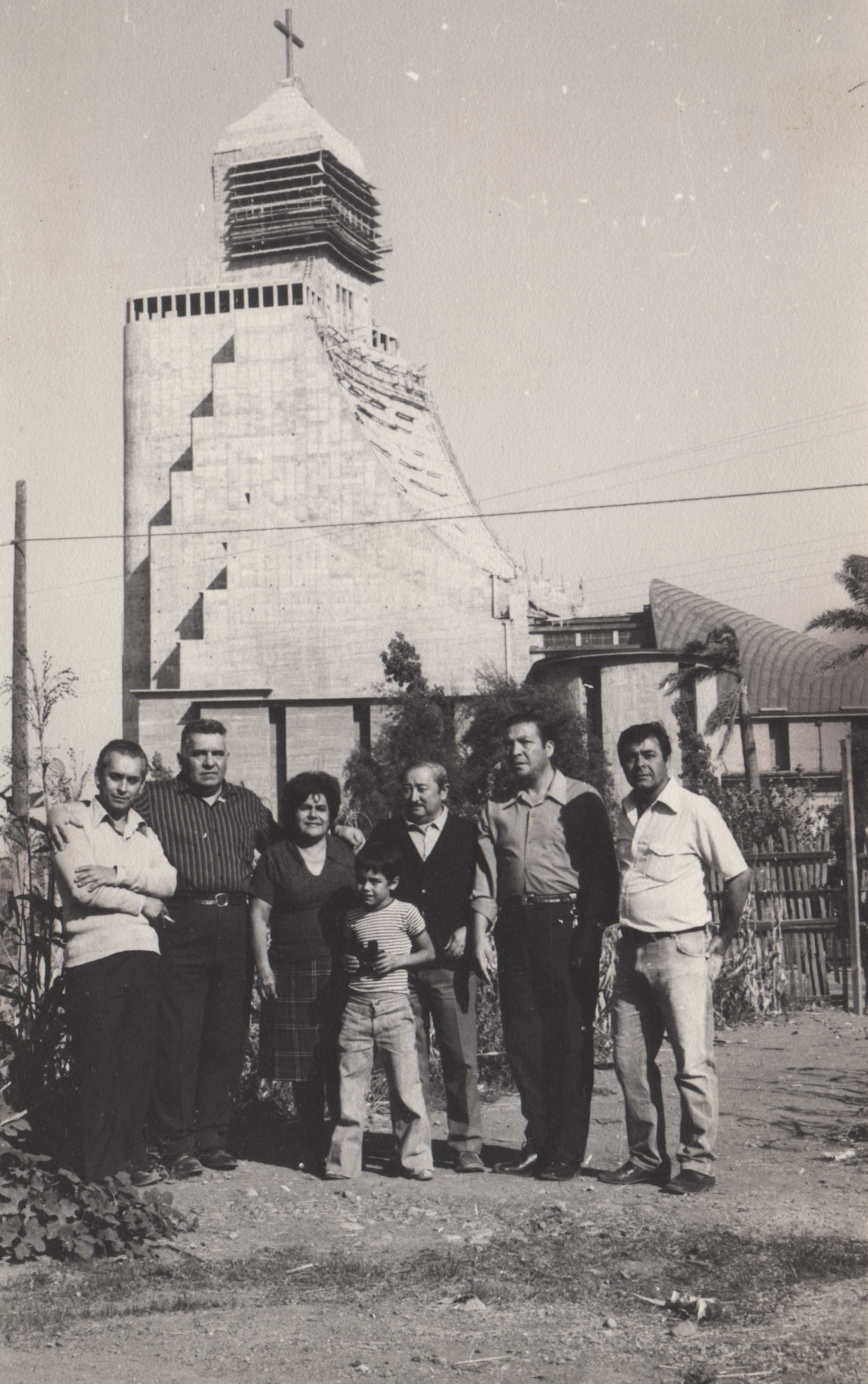 Un grupo de personas posando ante la Basílica Nacional de Maipú aún en construcción en marzo de 1976. Fotografía de archivo familiar (como autor figura M.E.I.A.).